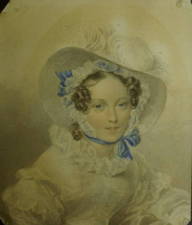 Надежда Львовна Соллогуб (1815-1903), жена А.Н.Свистунова.